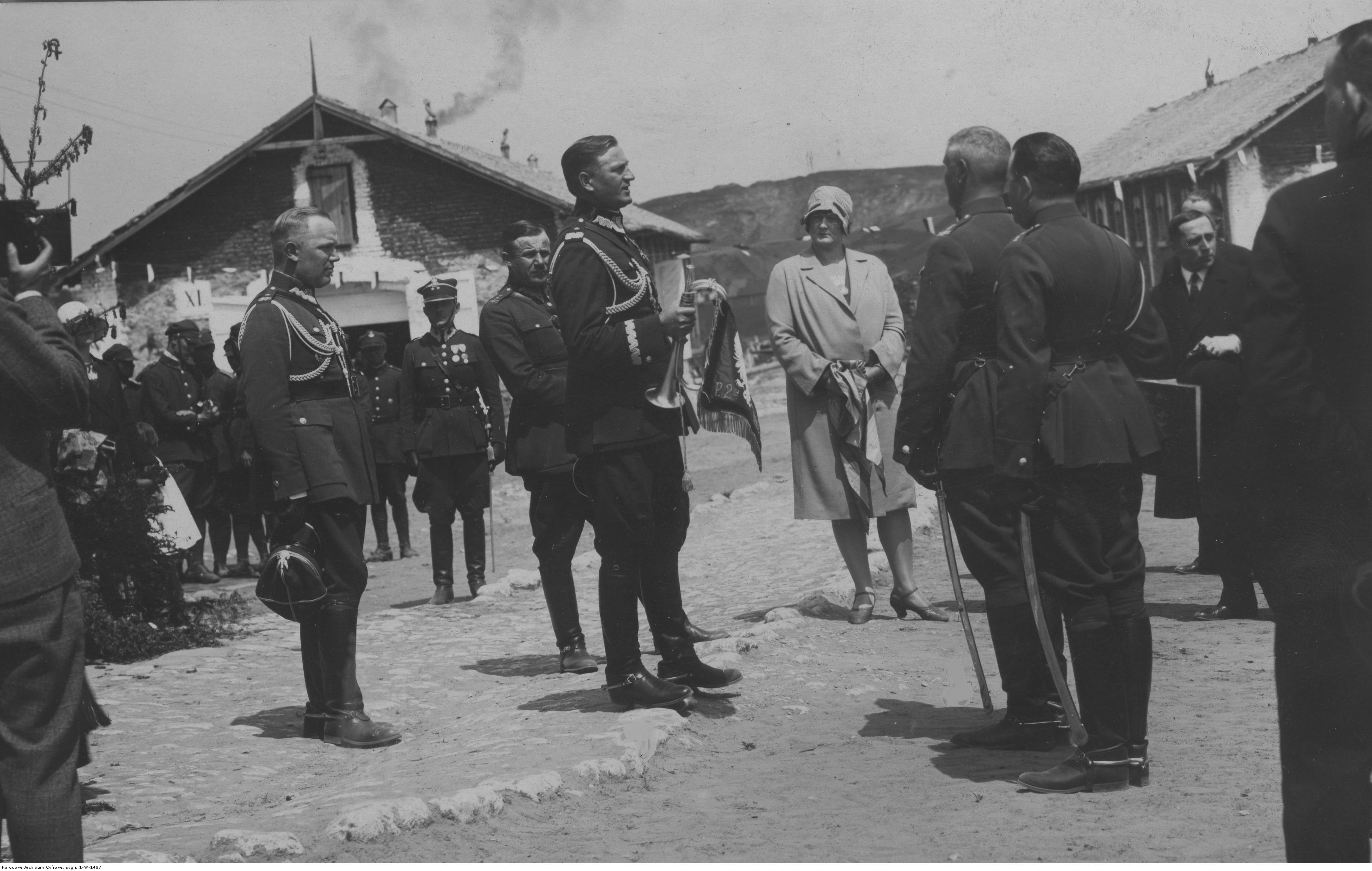 Dziesięciolecie 2 Pułku Artylerii Lekkiej w Kielcach; 1929 r. Gen. bryg. Aleksander Narbutt-Łuczyński (trzyma trąbkę) wręcza dowódcy 2 Pułku Artylerii Lekkiej ppłk. Stanisławowi Mańkowskiemu (na wprost generała) srebrną trąbkę sygnałową z płomieniem, dar 2 Dywizji Piechoty Legionów. Koncern Ilustrowany Kurier Codzienny - Archiwum Ilustracji. Sygnatura: 1-W-1487